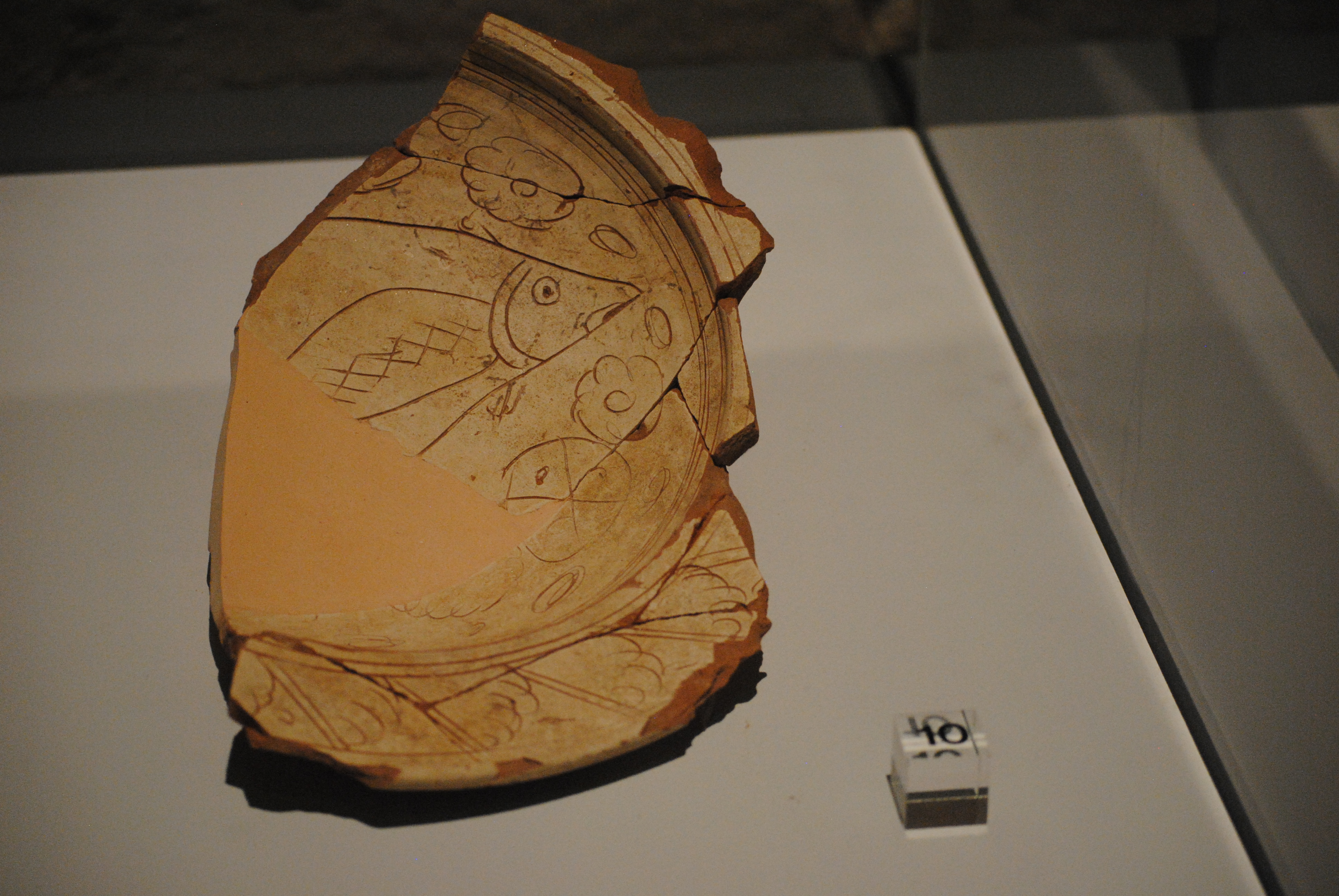 Scodella ingobbiata e graffita a punta (scarto di pirma cottura), risalente al 1500 - 1530 (rinvenuta durante gli scavi di villa Quercioli, Pisa) - Museo nazionale di San Matteo.